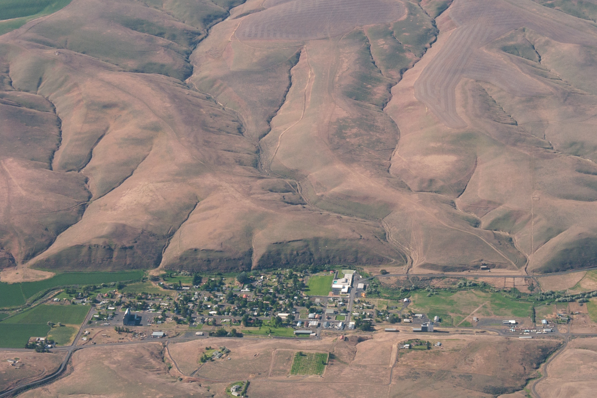 Ione, Oregon